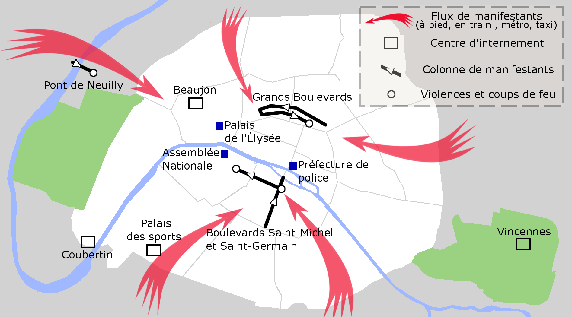 Plan réalisé à partir des descriptions et croquis des ouvrages suivants : "Police contre FLN" de Jean-Paul Brunet Flammarion ; "Paris 1961" de Jim House et Neil MacMaster Tallandier.